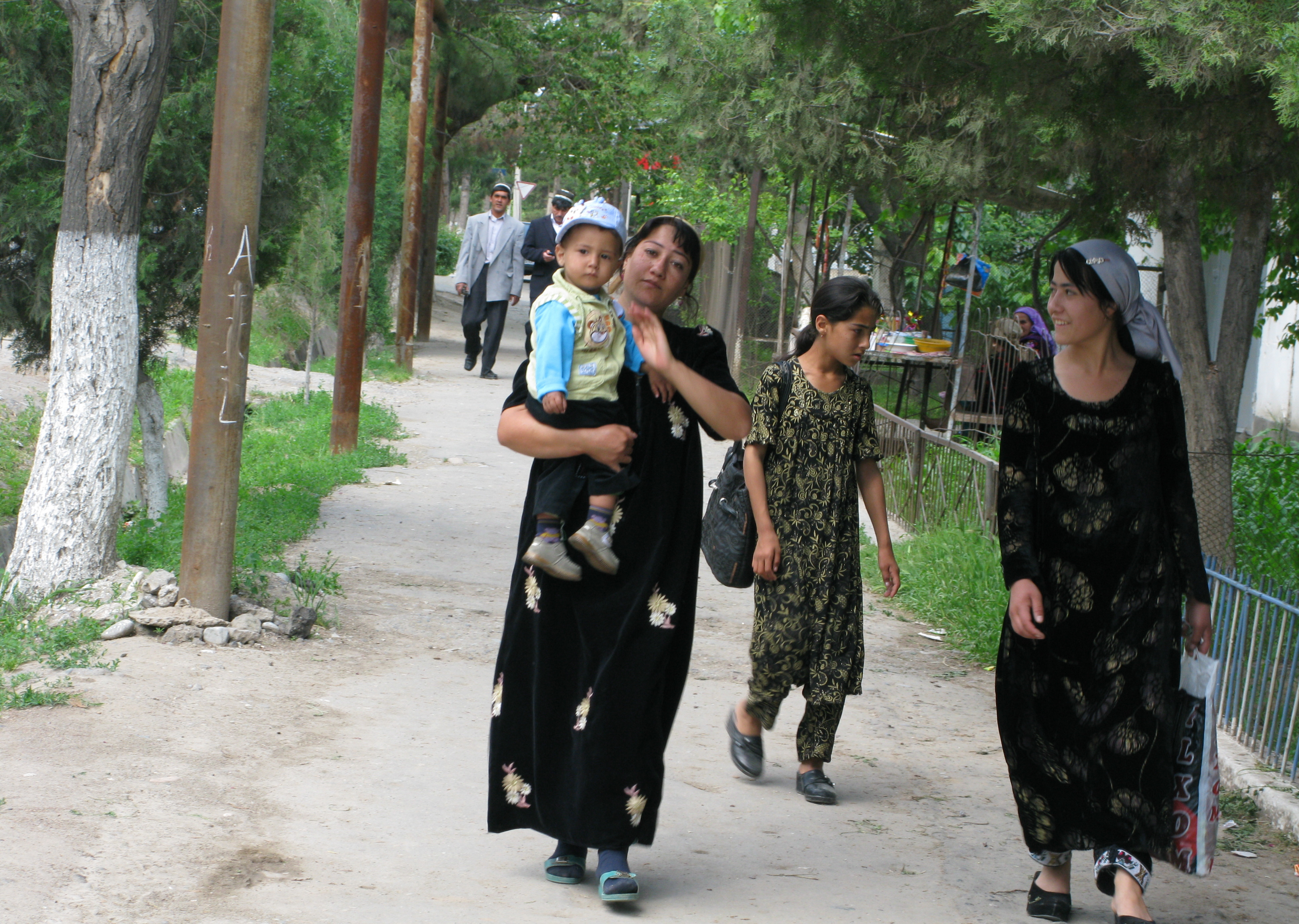 Женщины с детьми на улицах Денау в районе хлопзавода